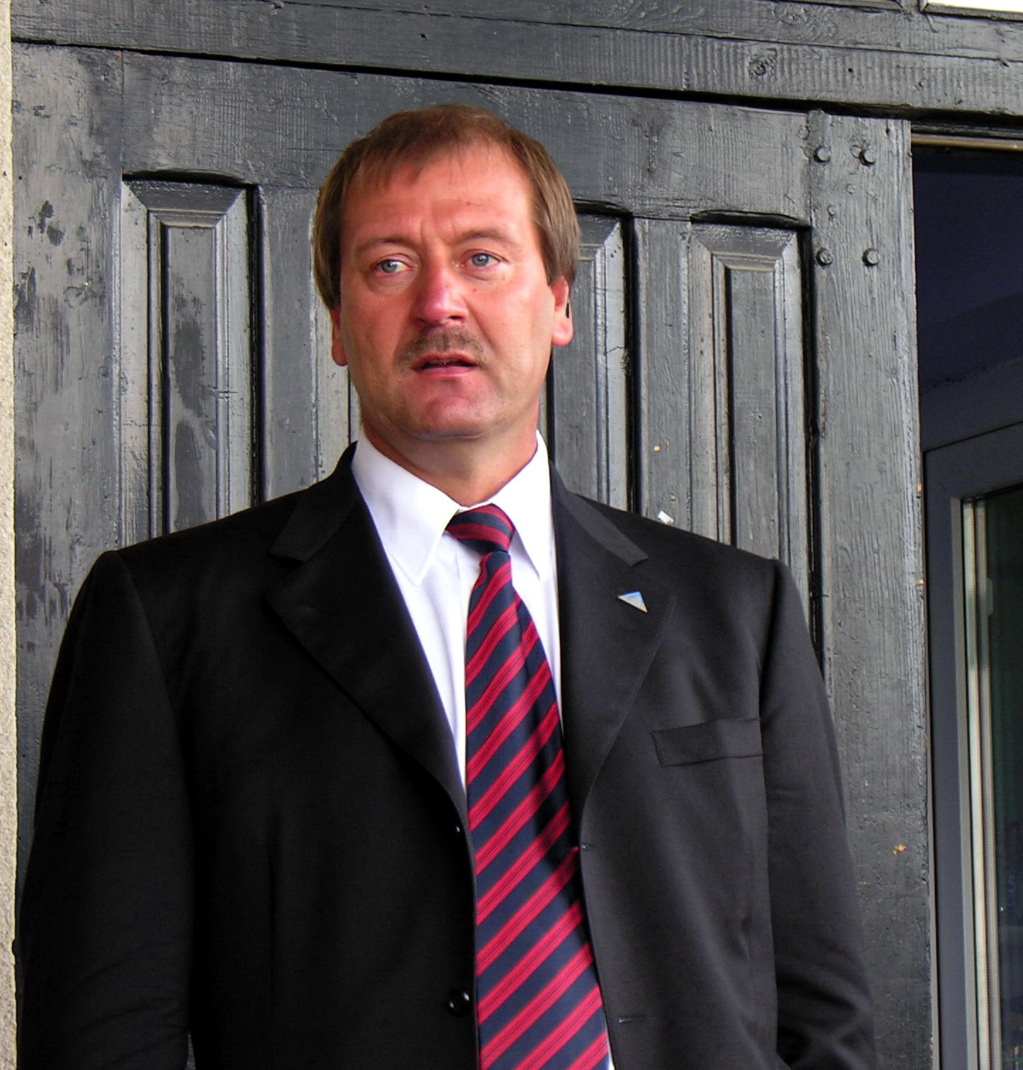 Viktoras Uspaskichas 2008 m. liepos 08 d.